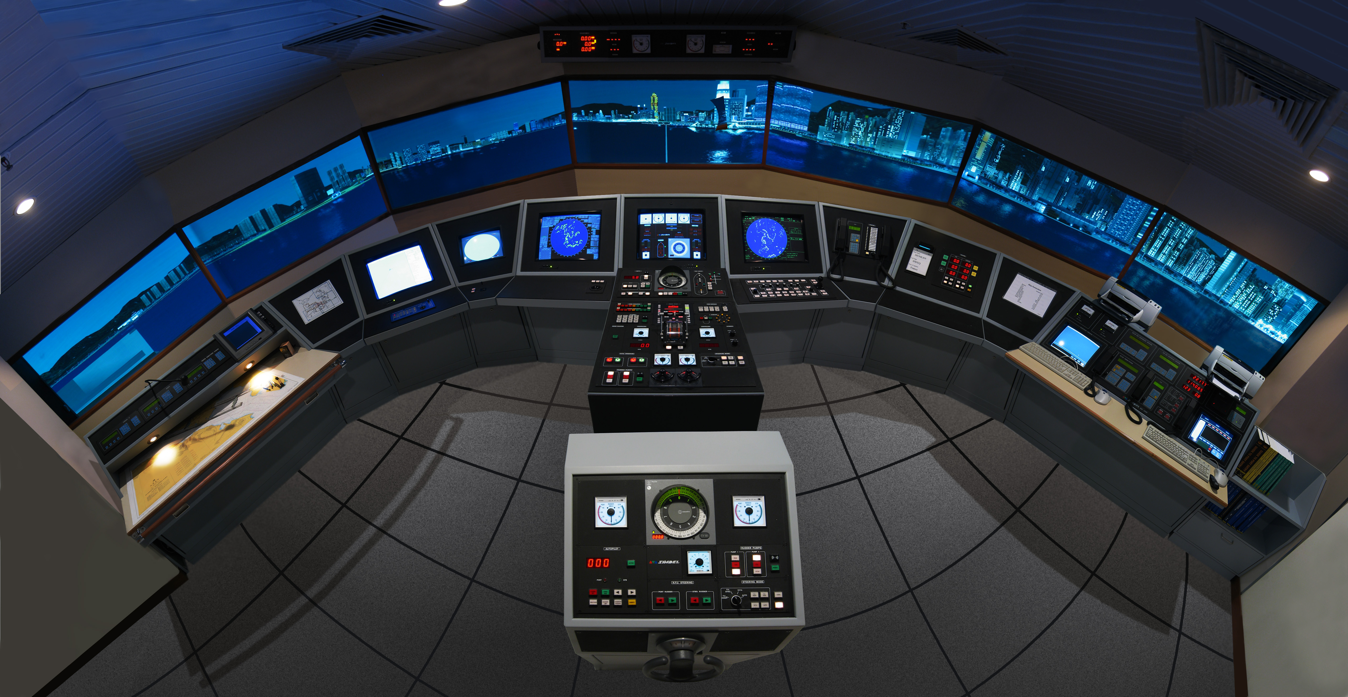 Simulatore navale professionale installato presso il "Marine Department" di Hong Kong